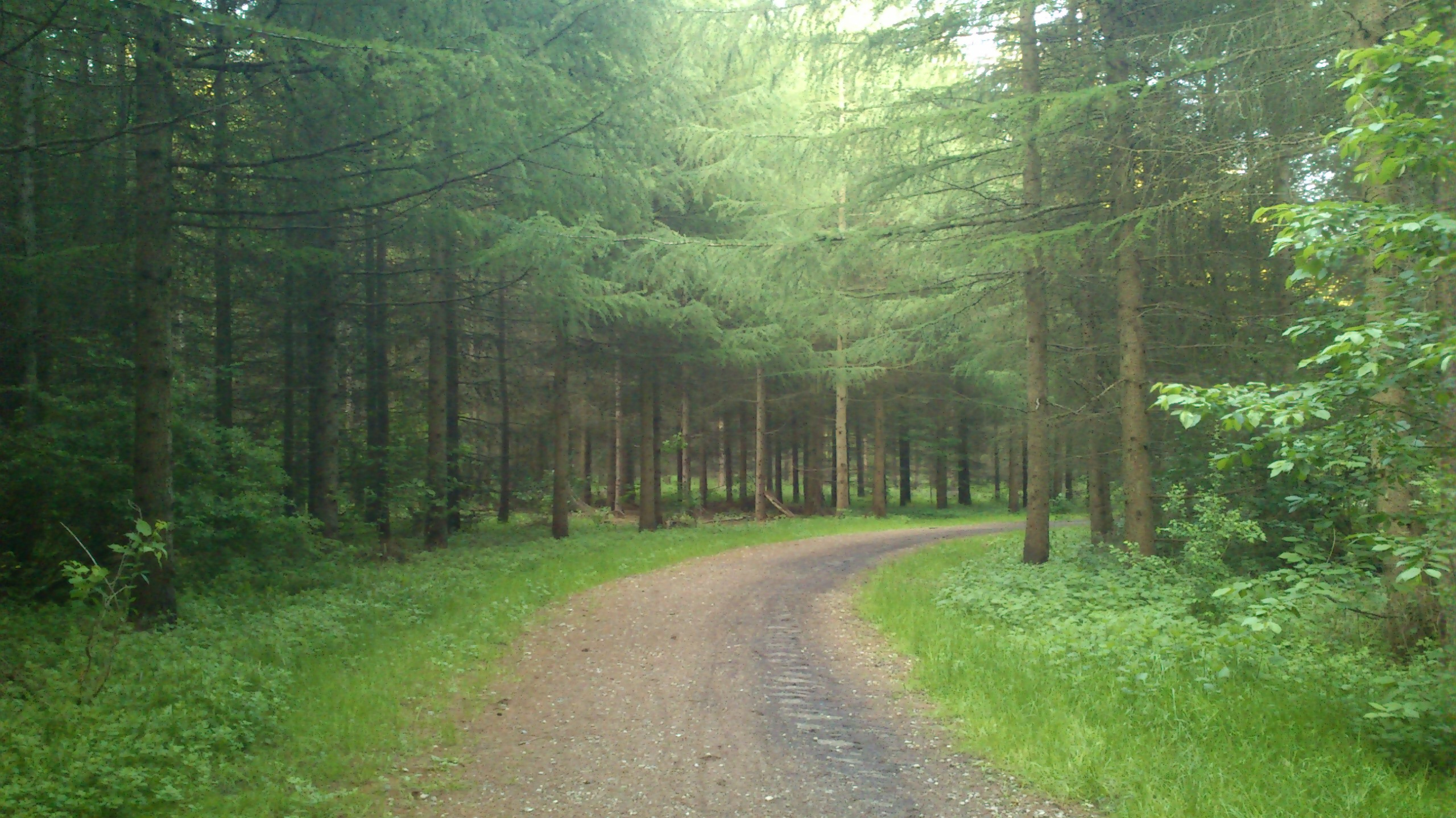 Sti mellem lærketræerne i Brendstrup Skov